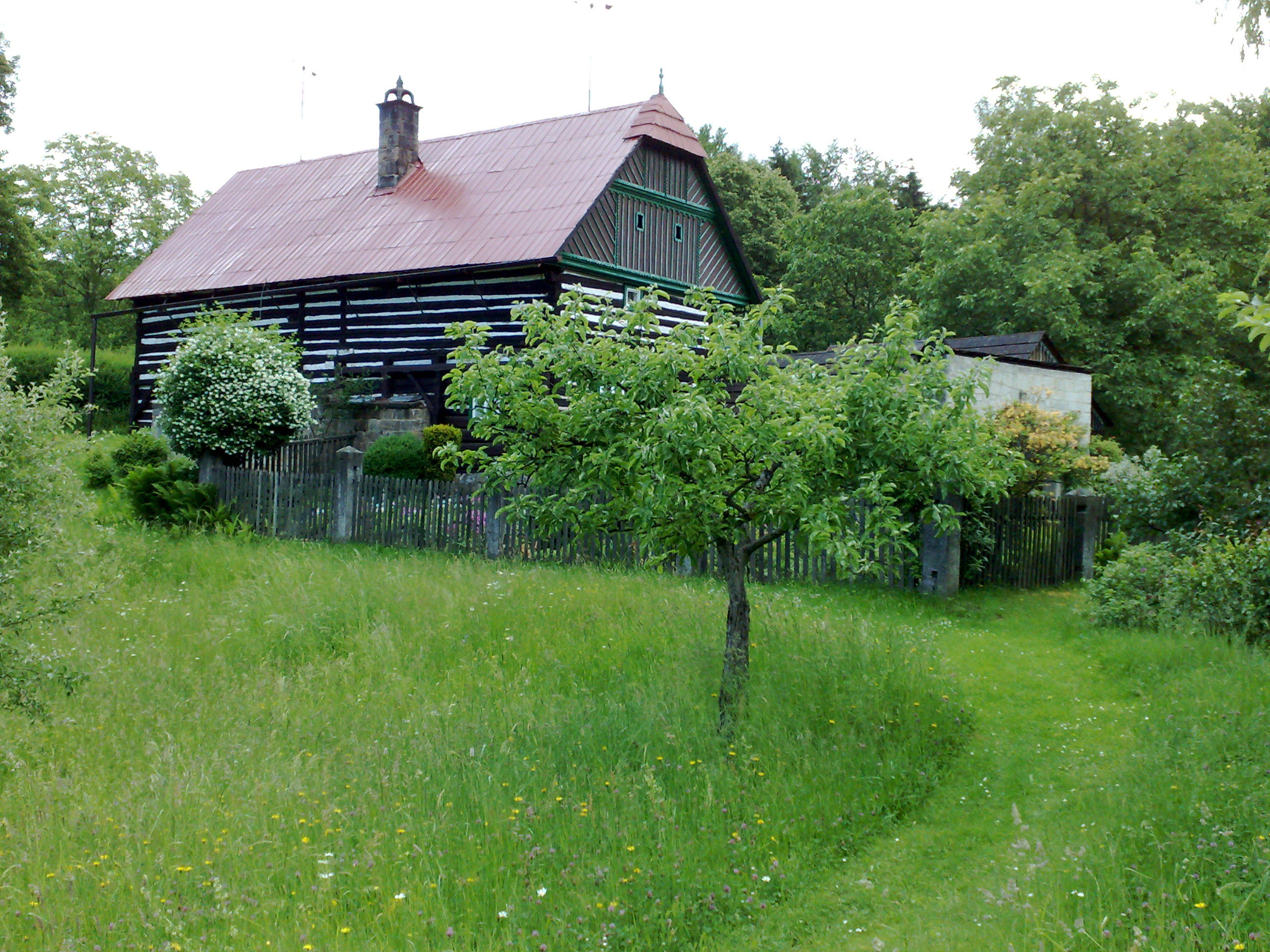 Kopicuv statek, Cesky Raj, CZ